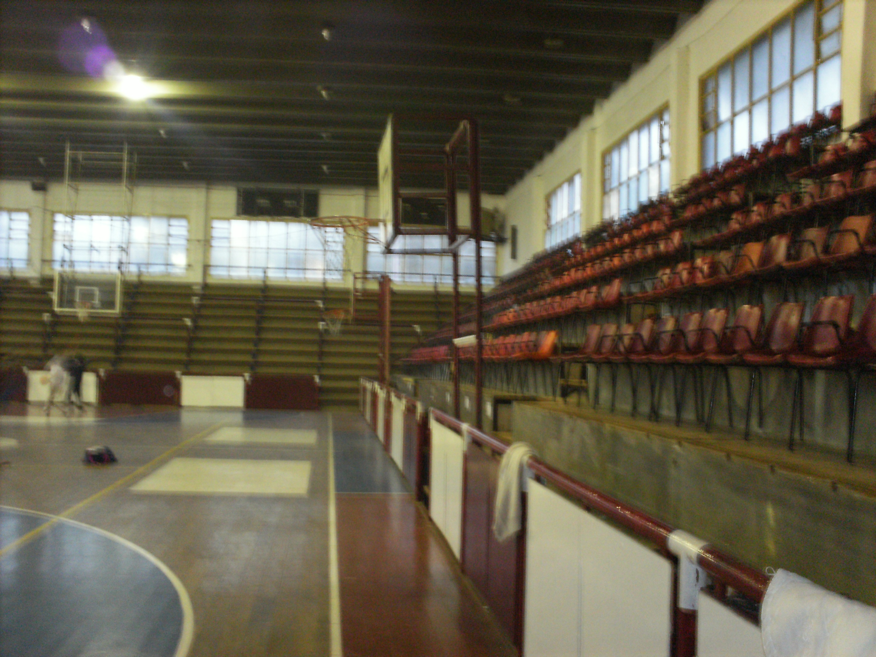 En el estadio de la fede, donde tantas veces enfrento sus rivales